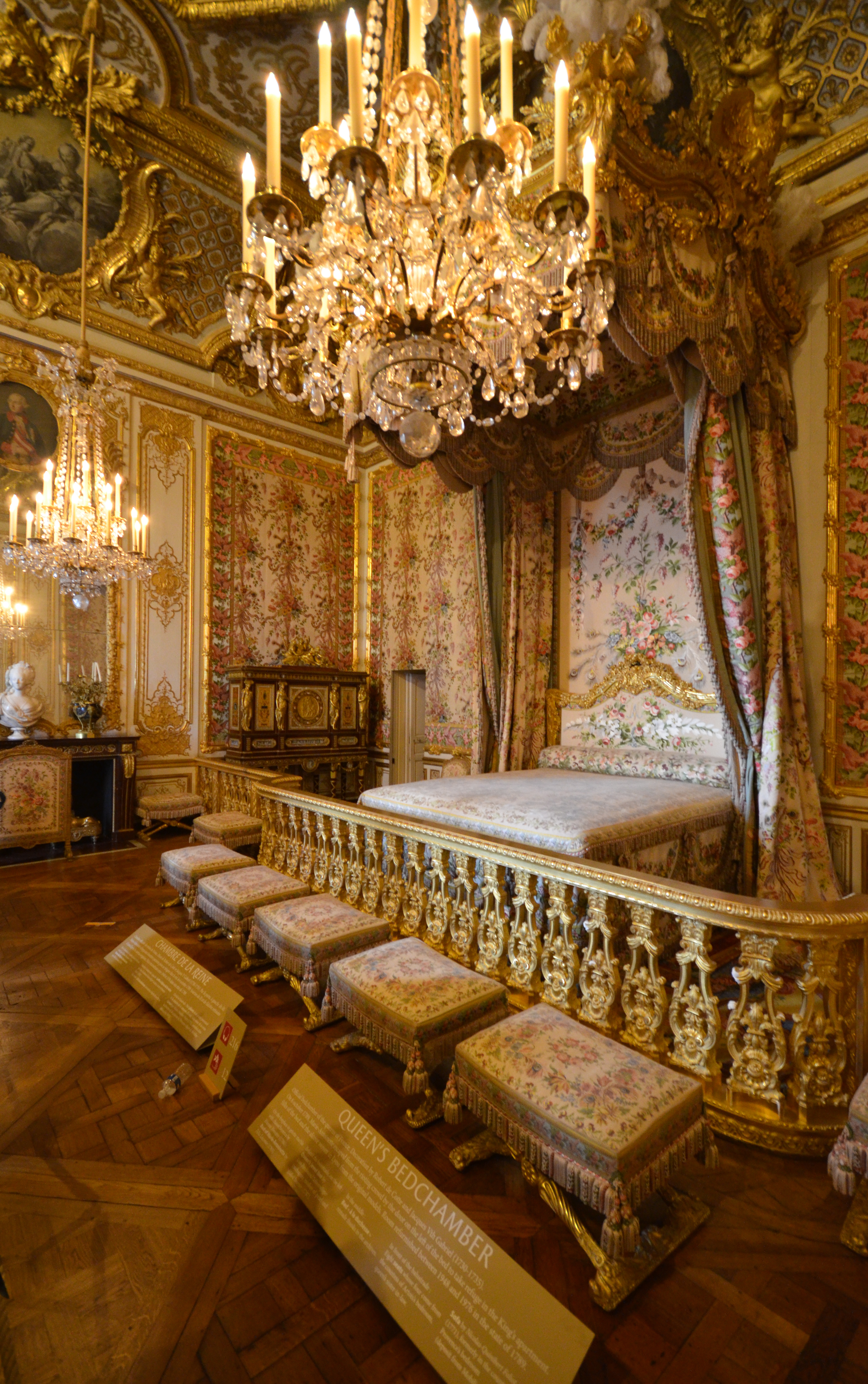 La chambre de la Reine du Château de Versailles